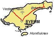 Laesoe island, Denmark